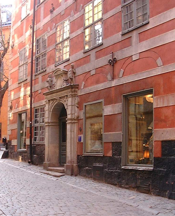 2, Själagårdsgatan (Cepheus 25) viewed from Köpmangatan, Gamla stan, Stockholm. Cropped.